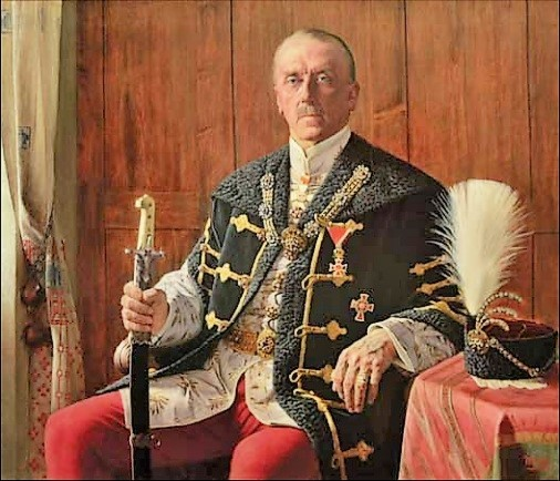 Friedrich Miess - Portretul lui Ottokar von Czernin